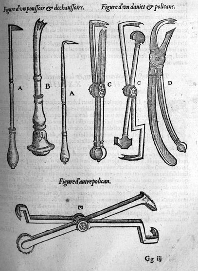 Ambroise Paré (1510?-1590): Les oeuvres d’Ambroise Paré, 1585.